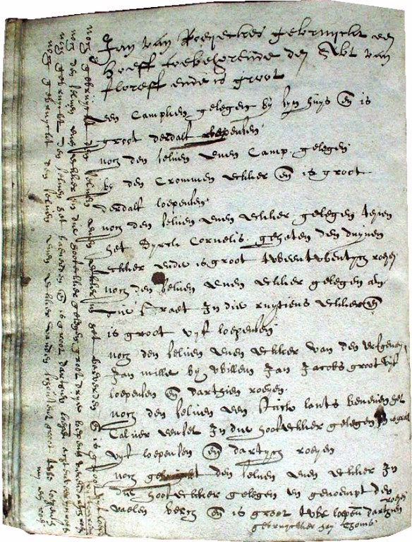 bladzijde uit maatboek 1628 van Lieshout